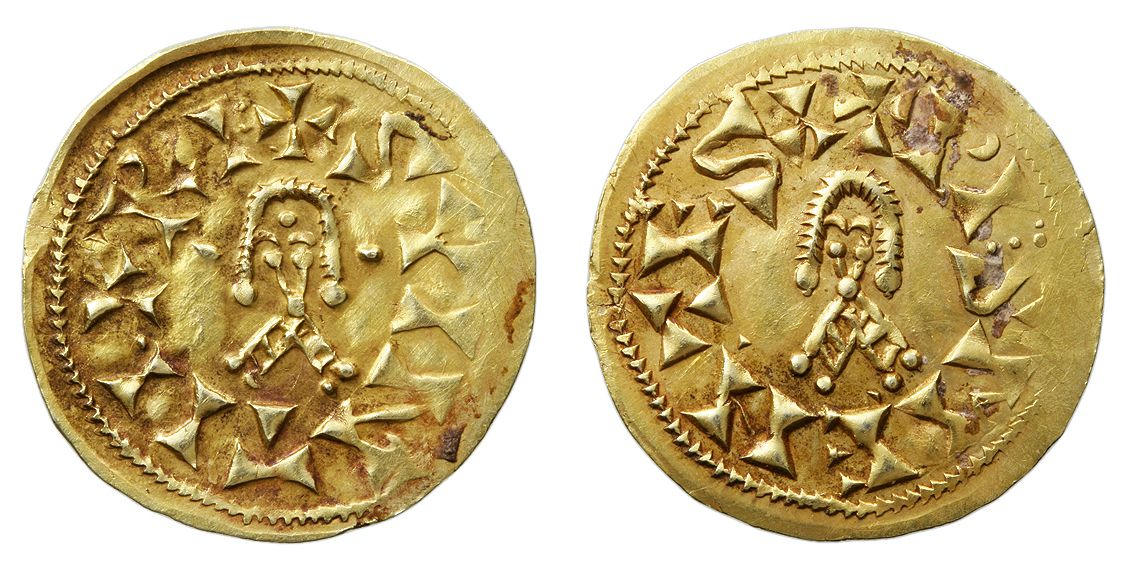 Tremis visigodo de oro acuñado en Mentesa (cerca de la actual La Guardia de Jaén) durante el reinado de Suintila. Leyendas: anverso "+SVINTHILA RE:" reverso "+PI:·S MENTESA".